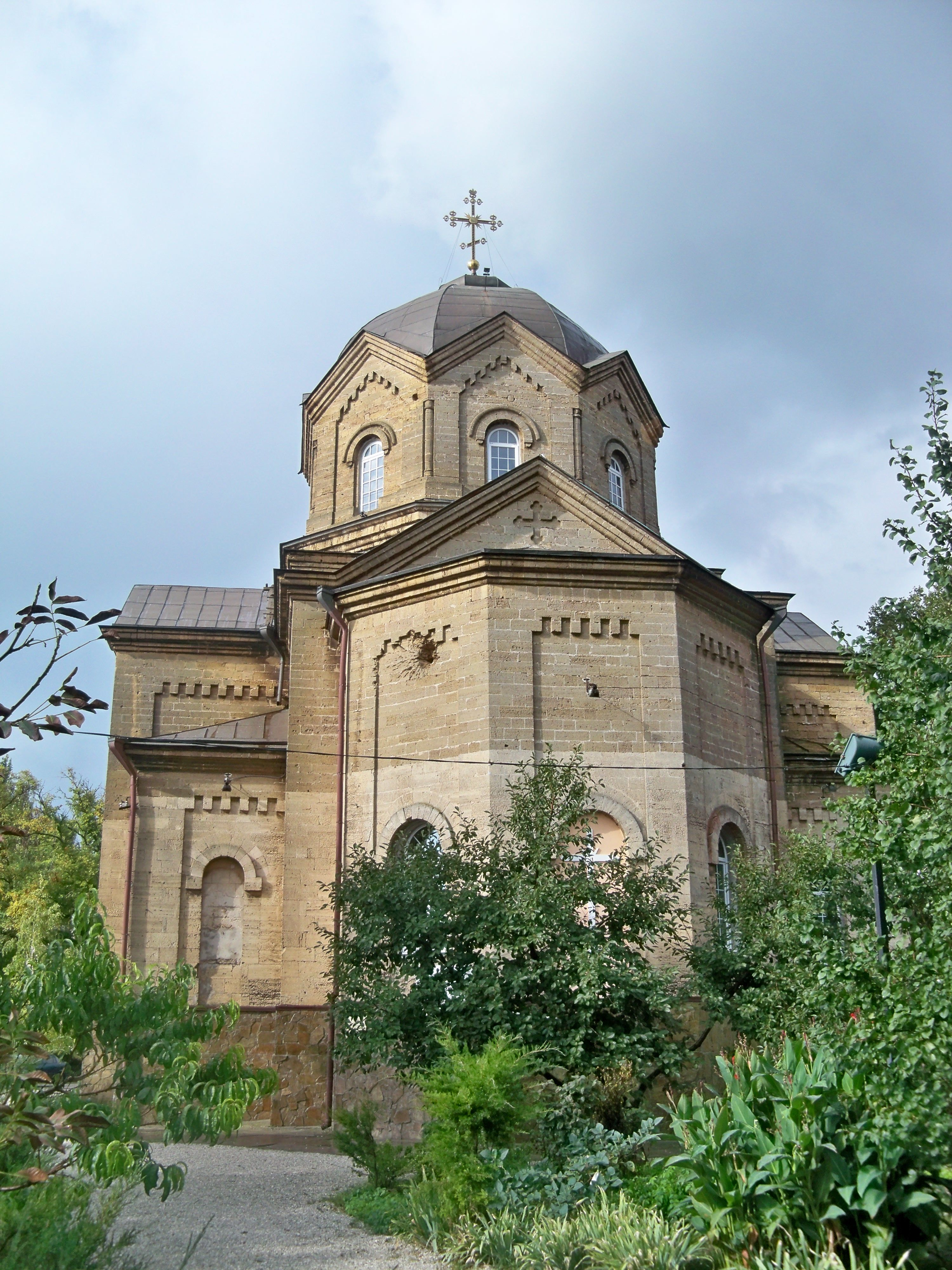 Грецька церква, Євпаторія, вул. Бр. Буслаевих, 13